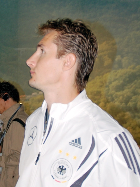 Miroslav Klose, Deutscher Fußballnationalspieler